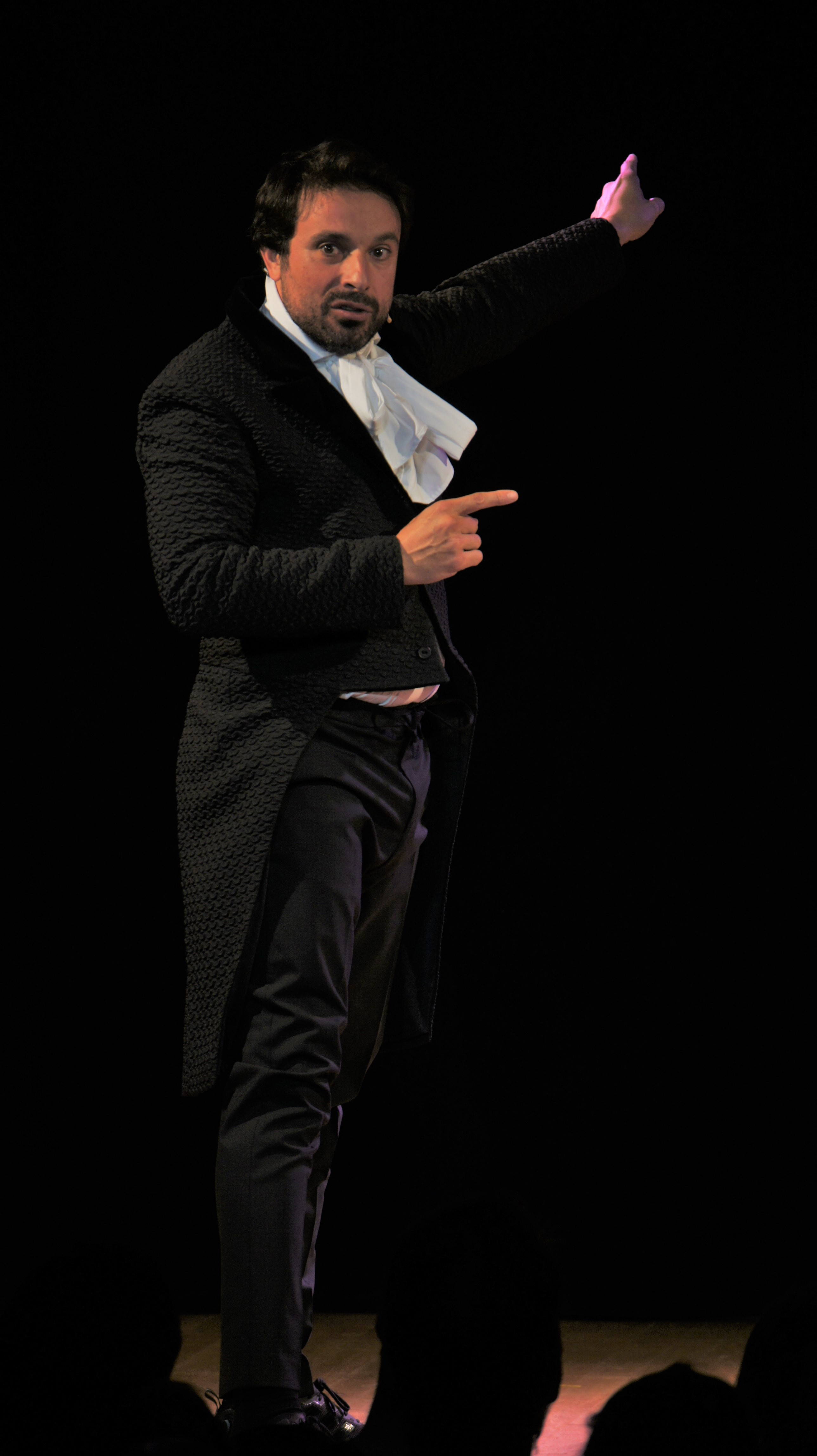 Bruno Salomone pendant son spectacle Euphorique